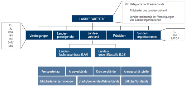 Organigramm des CDU-Landesverbandes Sachsen